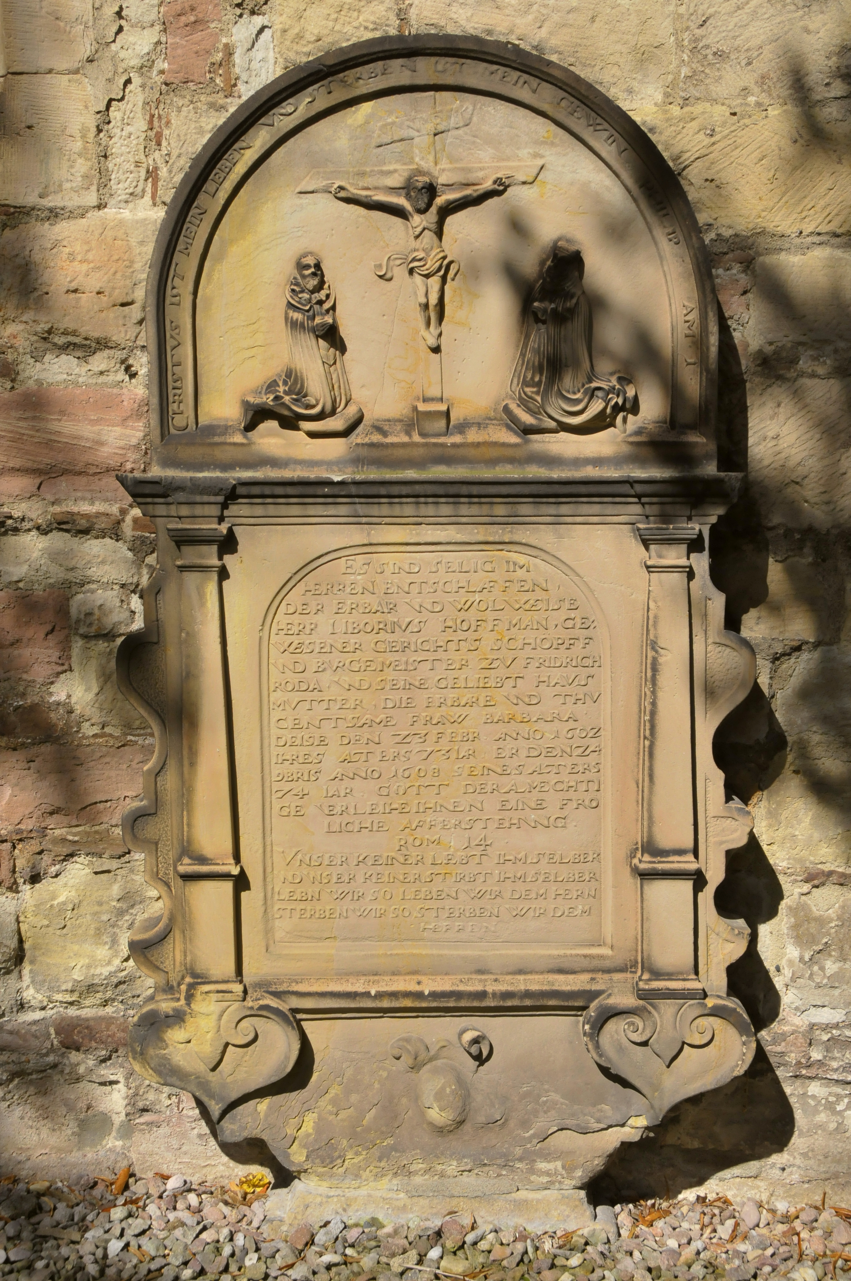 Friedrichroda, Kirche, Grabplatte von Ehepaar Hoffman